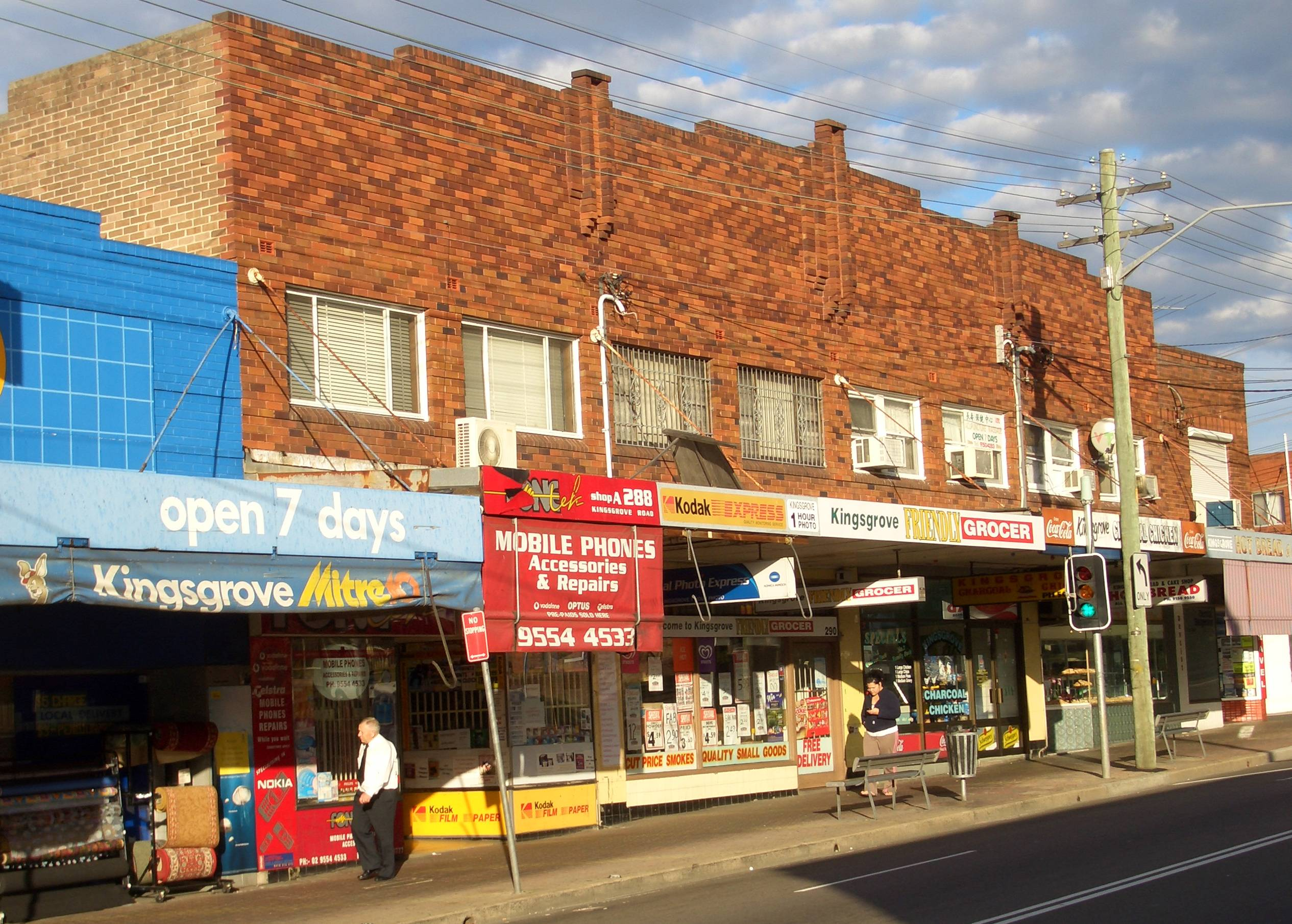 Kingsgrove Road, Kingsgrove, Sydney